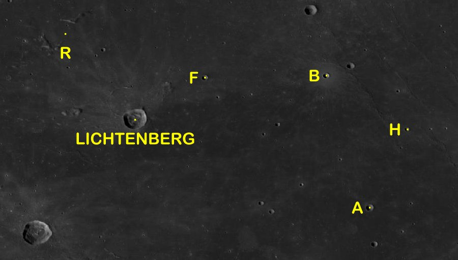 Cráter lunar Lichtenberg. Cráteres satélite. (Imagen LRO)